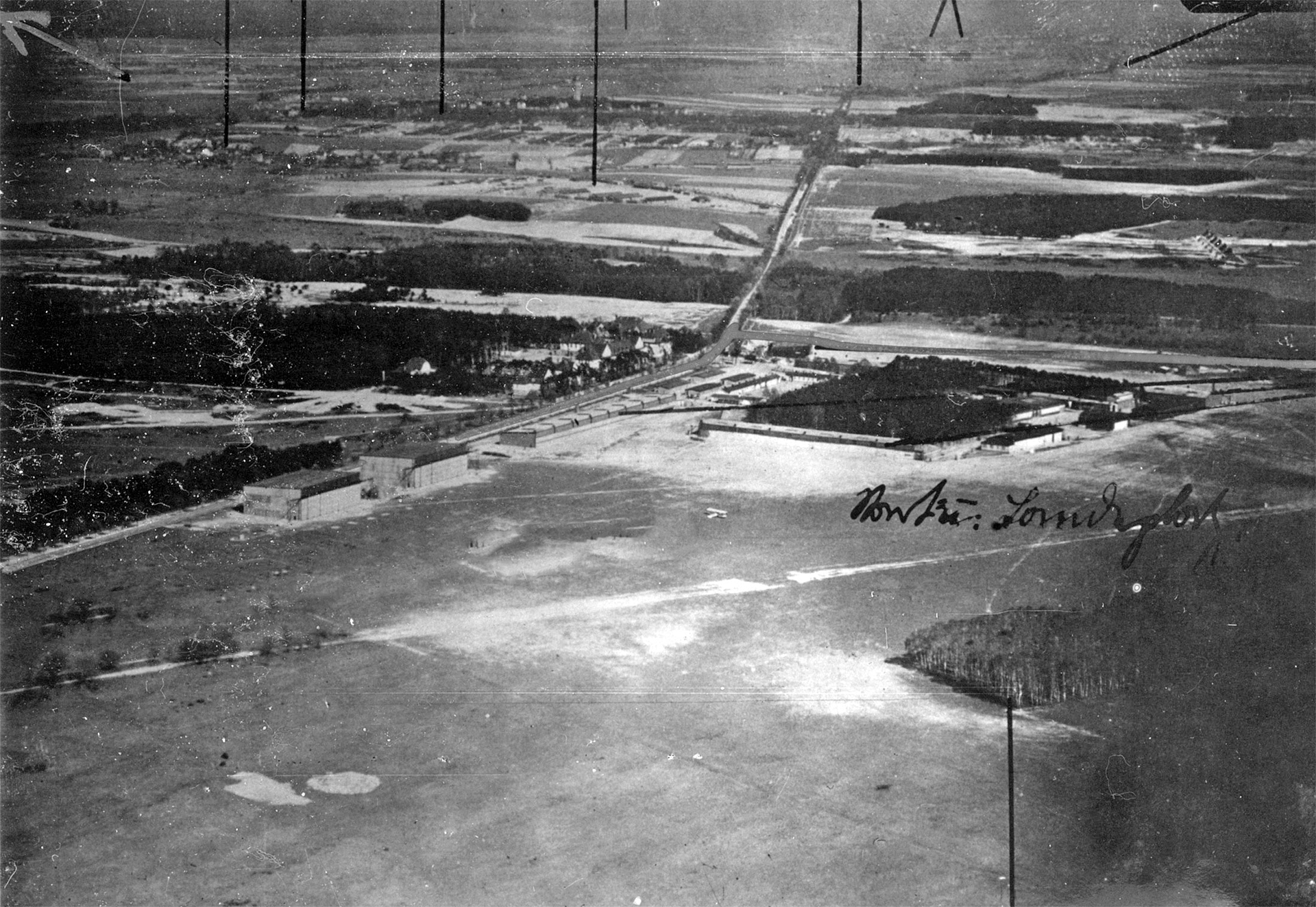 Schrägluftbild des Flugplatzes Döberitz aus dem Flugplatz-Atlas, der um 1917 herausgegeben wurde. In Sütterlin ist der Text Start- u. Landeplatz ins Bild geschrieben. Der Pfeil oben links entspricht der Nordrichtung.